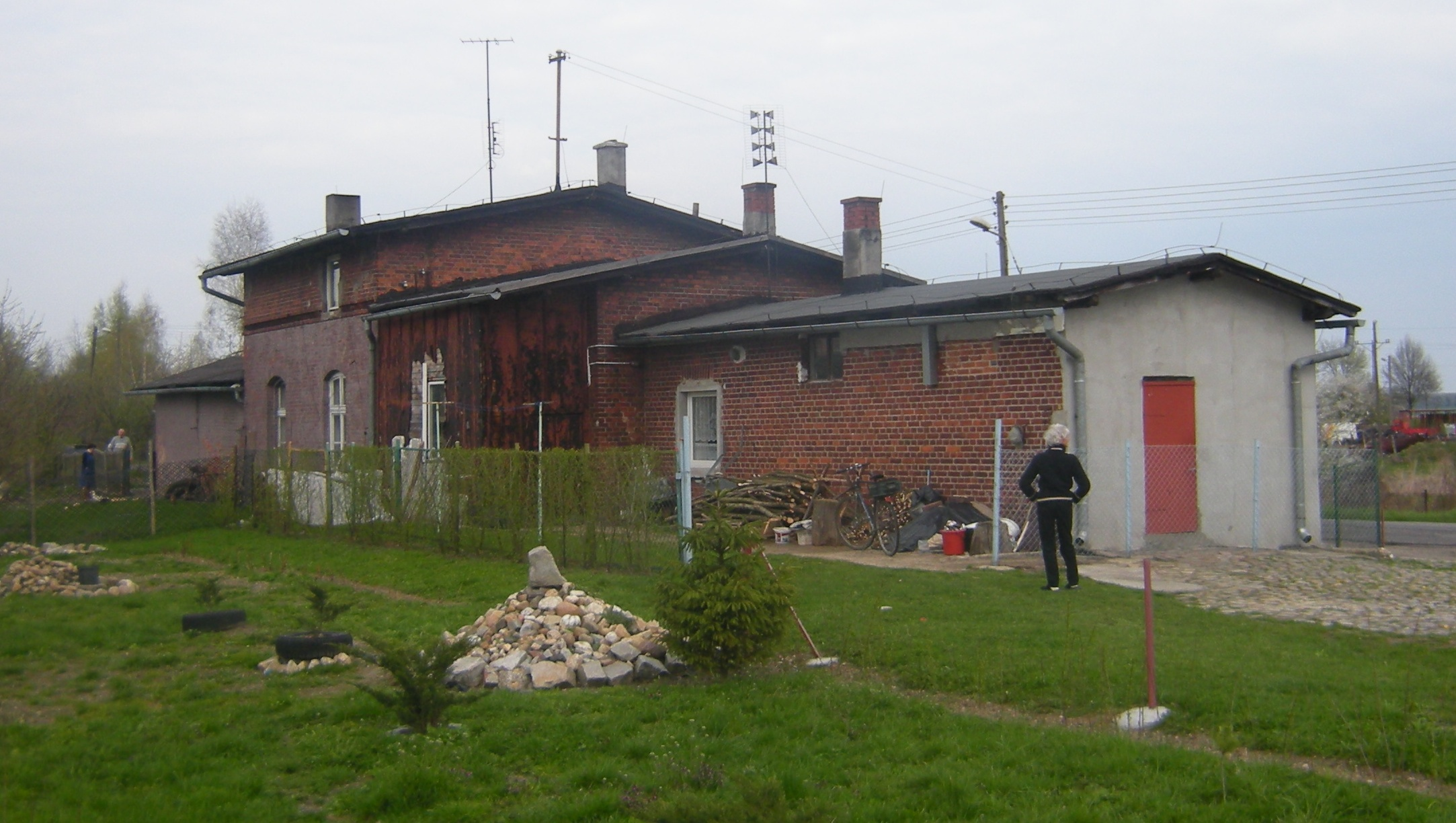 Były przystanek kolejowy w Białej Nysce